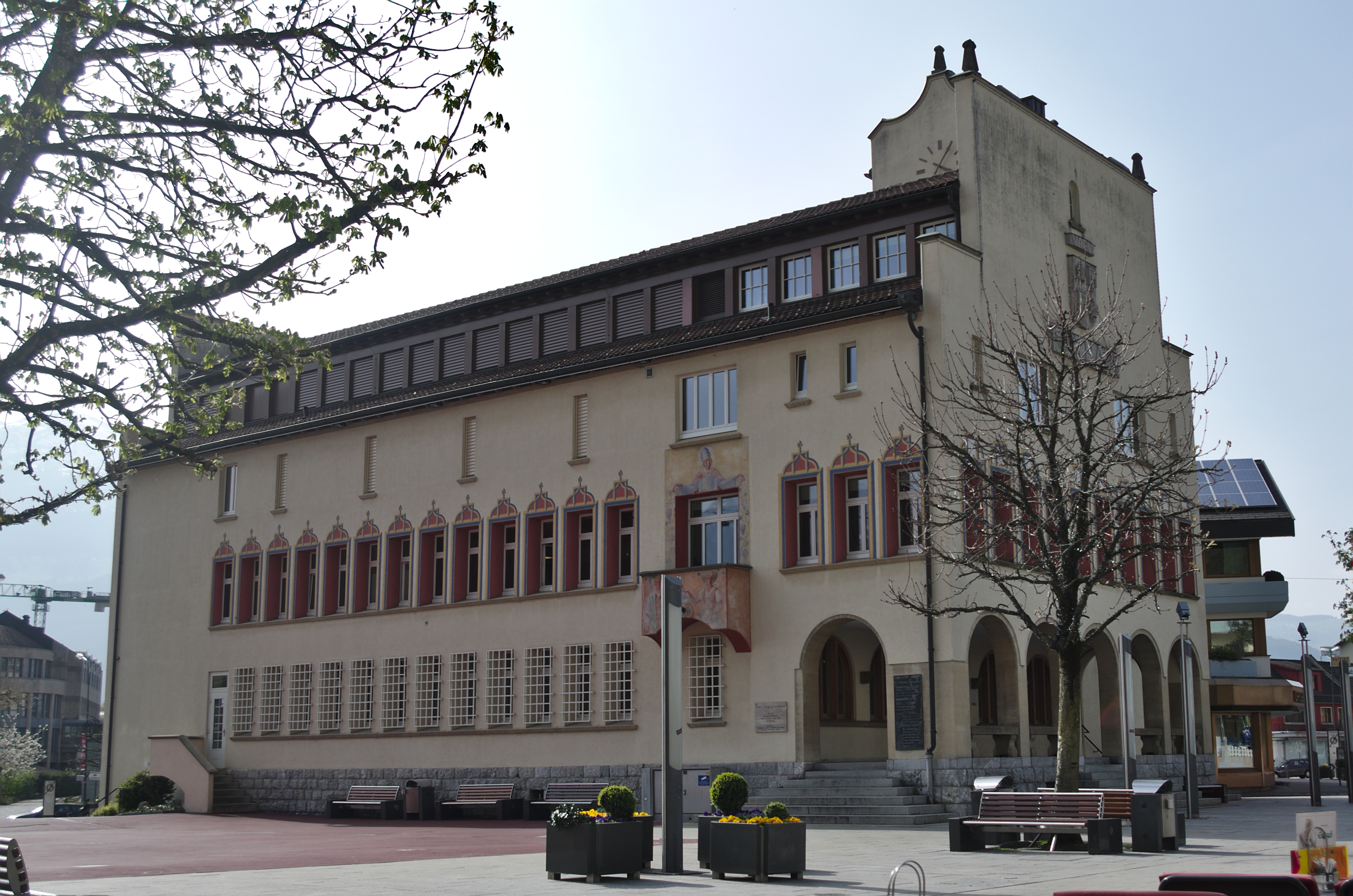 Vaduz - 31032014 - Rathaus